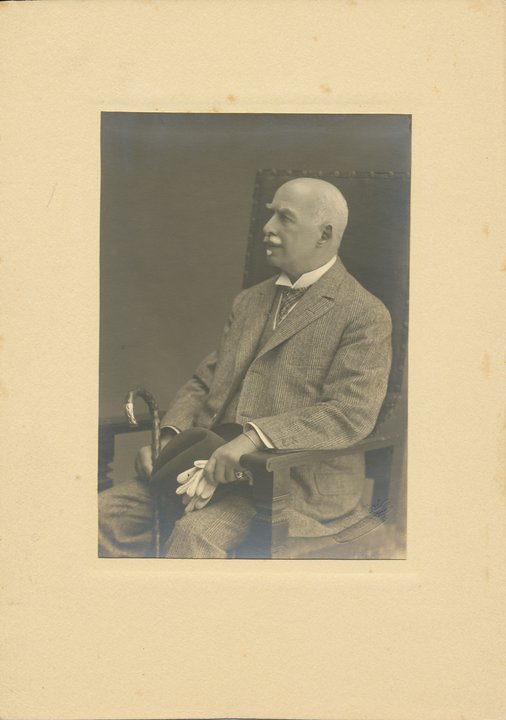 altes Foto von Walter von Simon